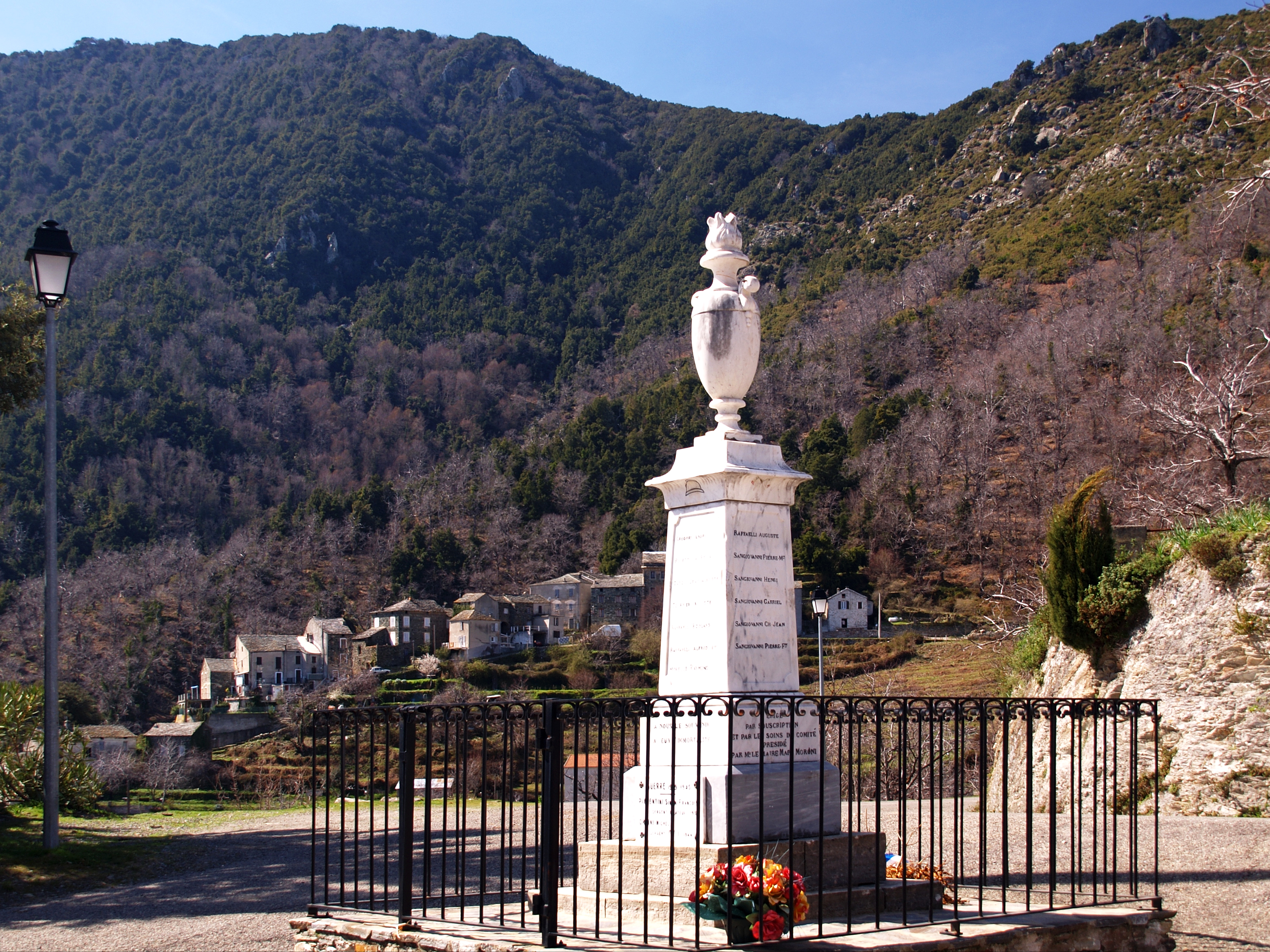 Corsu: Ortiporio, Casacconi (Corsica) - Munimentu di fronte à chjesa paruchjale San Austinu. A la luntana, u paisolu di Piazza